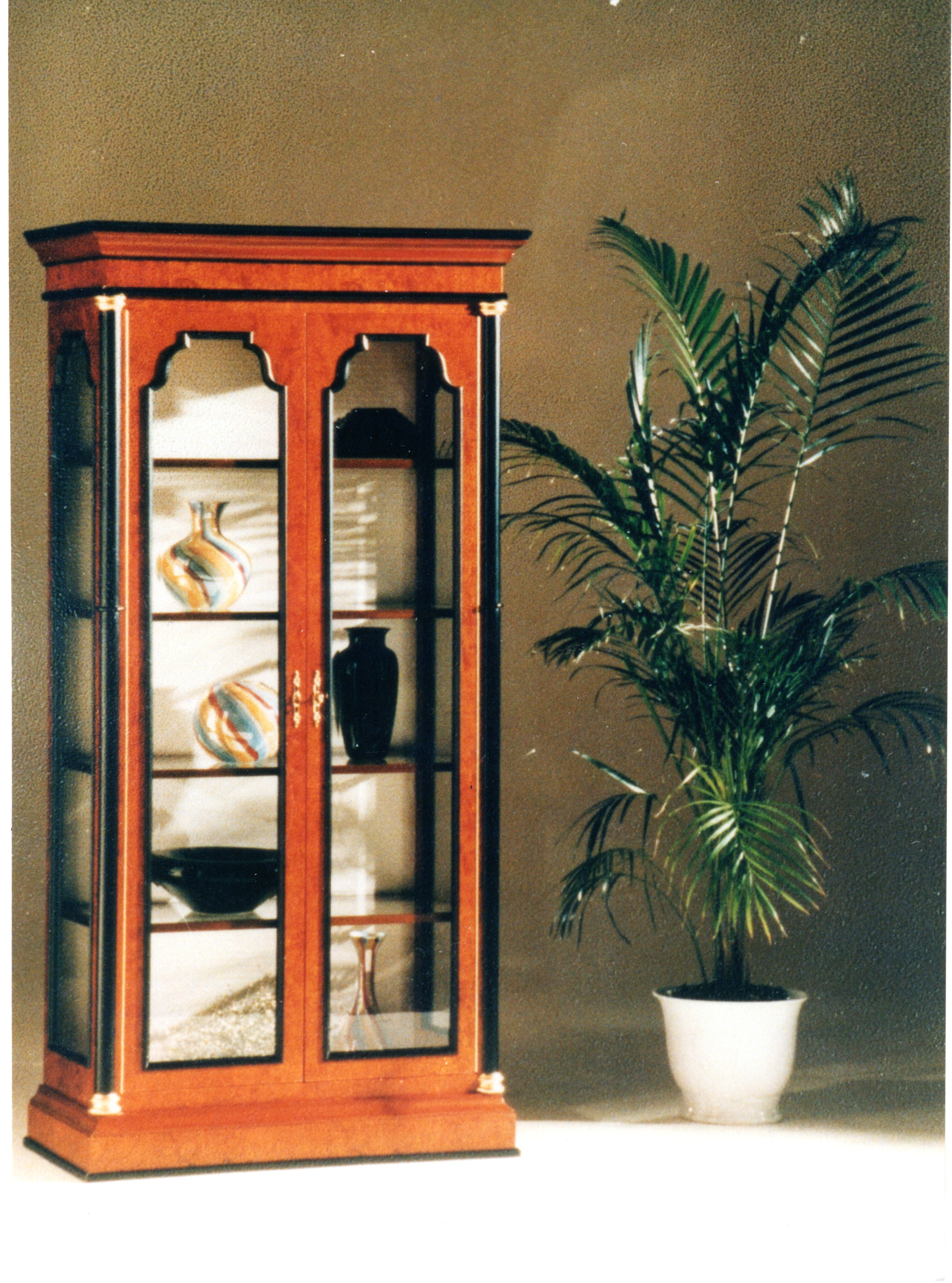 Vitrine „Meißen" in cognacfarbener Birkenmaser, mit ebonisierten Profilen und Säulen, 1980er Jahre / Josef Günther Stilmöbelfabrik, Steinheim/Westfalen